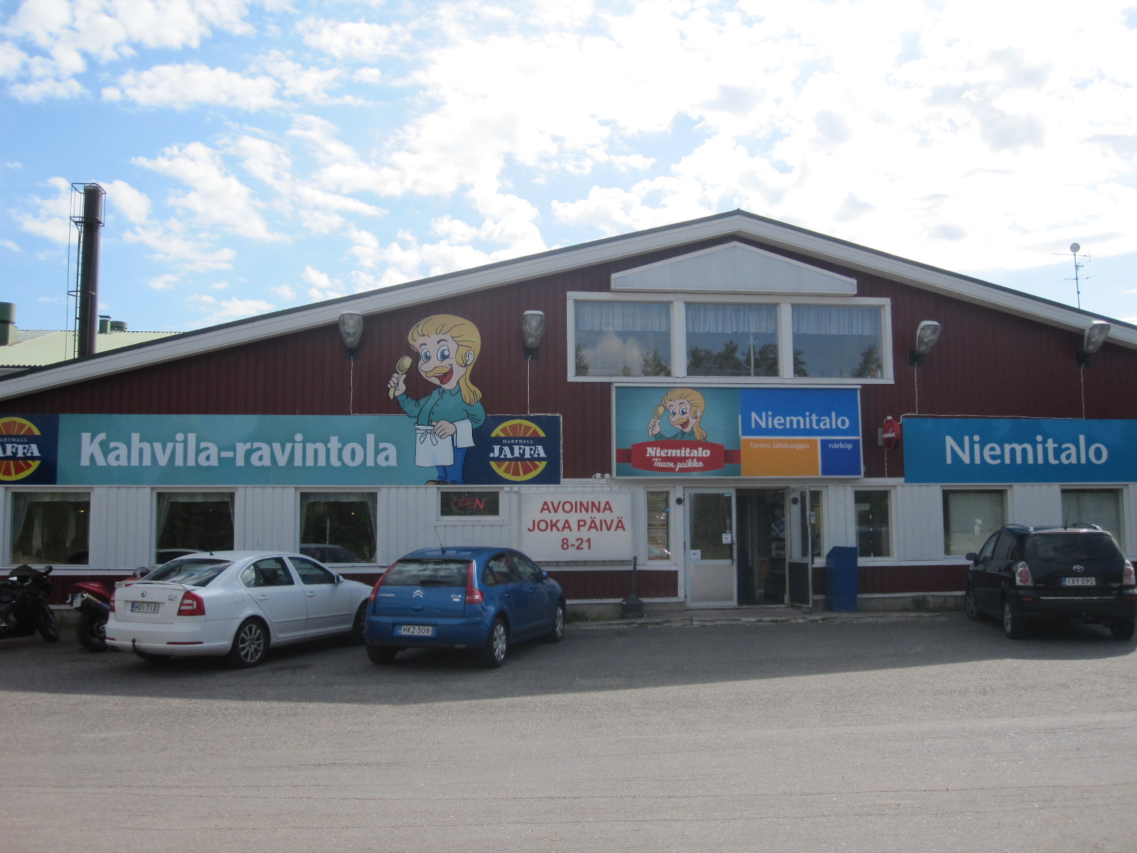 Pudasjärven Kipinän kylässä Hetekyläntien (yhdystie 8361) ja valtatien 20 risteyksessä sijaitseva A. A. Niemitalo Oy:n toimitilat (Niemitalon juustola).